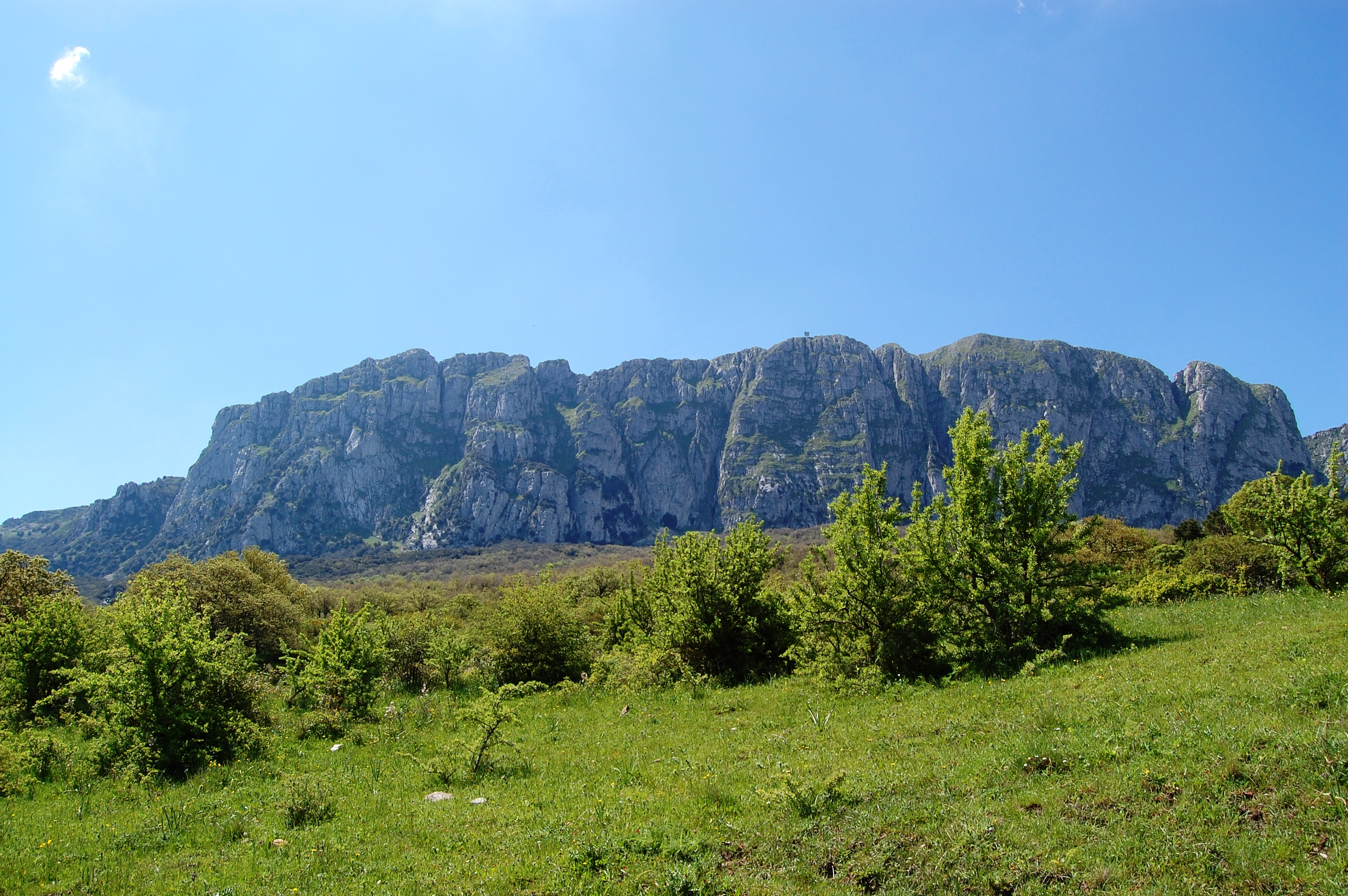 Bosco della Ficuzza, Sicily Rocca Busambra